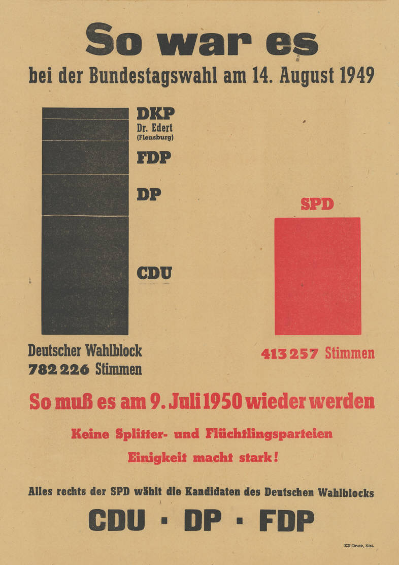 So war es bei der Bundestagswahl am 14. August 1949 DKP Dr. Edert (Flensburg) FDP DP CDU Deutscher Wahlblock 782226 Stimmen SPD 413257 Stimmen So muß es am 9. Juli 1950 wieder werden Keine Splitter- und Flüchtlingsparteien Einigkeit macht stark! Alles rechts der SPD wählt die Kandidaten des Deutschen Wahlblocks CDU . DP . FDP Abbildung: Grafik Plakatart: Textplakat Allgemein Drucker_Druckart_Druckort: KN-Druck, Kiel Objekt-Signatur: 10-012 : 54 Bestand: Landtagswahlplakate Schleswig-Holstein (10-012) GliederungBestand10-18: Landtagswahlplakate Schleswig-Holstein (10-012) » Deutscher Wahlblock (CDU, FDP, DP) Lizenz: KAS/ACDP 10-012 : 54 CC-BY-SA 3.0 DE